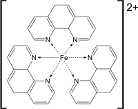 Ferroin, Strukturformel